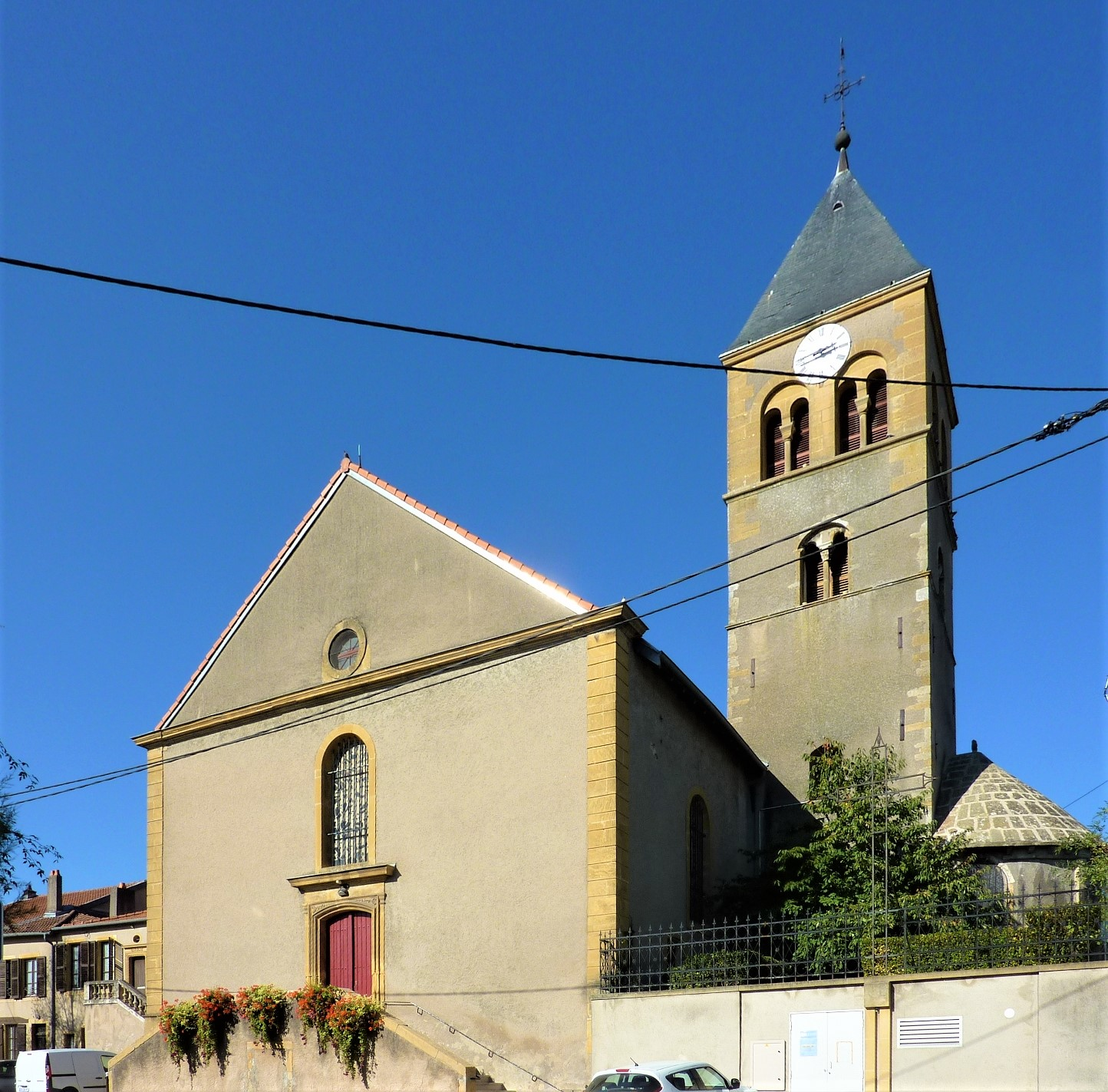 Église Sainte-Lucie de Vallières